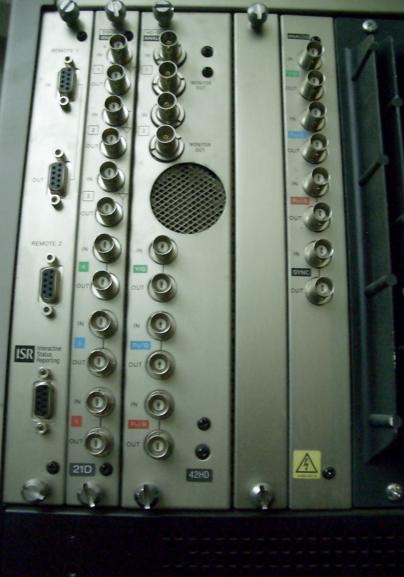 Sony HDCAM BVM-20 Monitor back